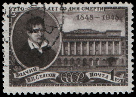 Бывшие Павловские казармы в Ленинграде, построенные по проекту В.П.Стасова (1817-1818).Почтовая марка СССР 1948г.